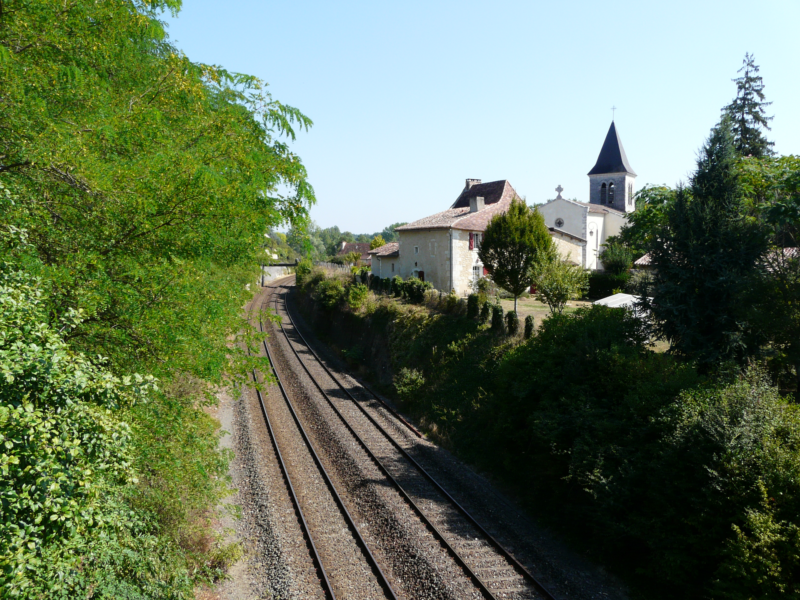 La ligne ferroviaire de Coutras à Tulle, Saint-Front-de-Pradoux, Dordogne, France.